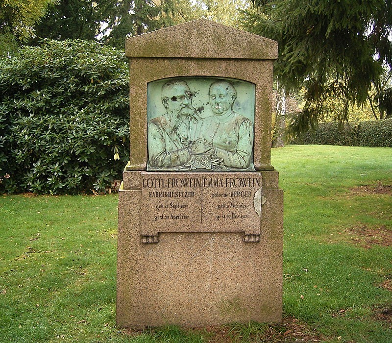 Radevormwald